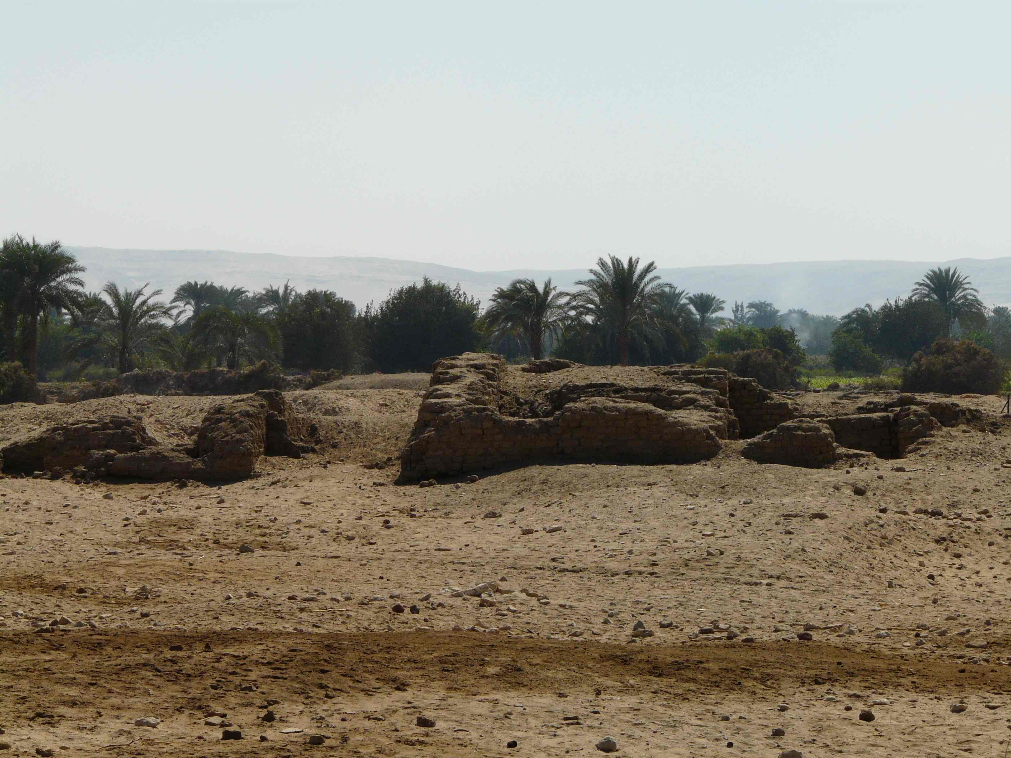 Amarna sud - Le Kôm el-Nana, vestige du sanctuaire "Ombre de Rê"